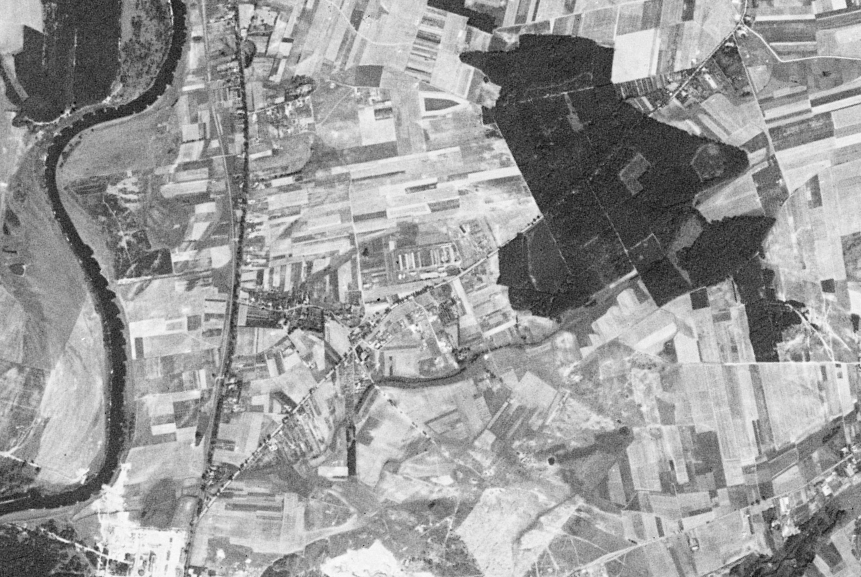 Koziegłowy i okolice sfotografowane przez amerykańskiego satelitę wywiadowczego KH-4A 1023, 23 sierpnia 1965 r. Widoczne tereny przy Warcie zajmowane współcześnie przez centralną oczyszczalnię ścieków dla Poznania (między Wartą a drogą nr 196 przebiegającej w kierunku północ-południe), jak i brak linii kolejowej. W prawym dolnym rogu wieś Bogucin. W prawym górnym, Kicin.